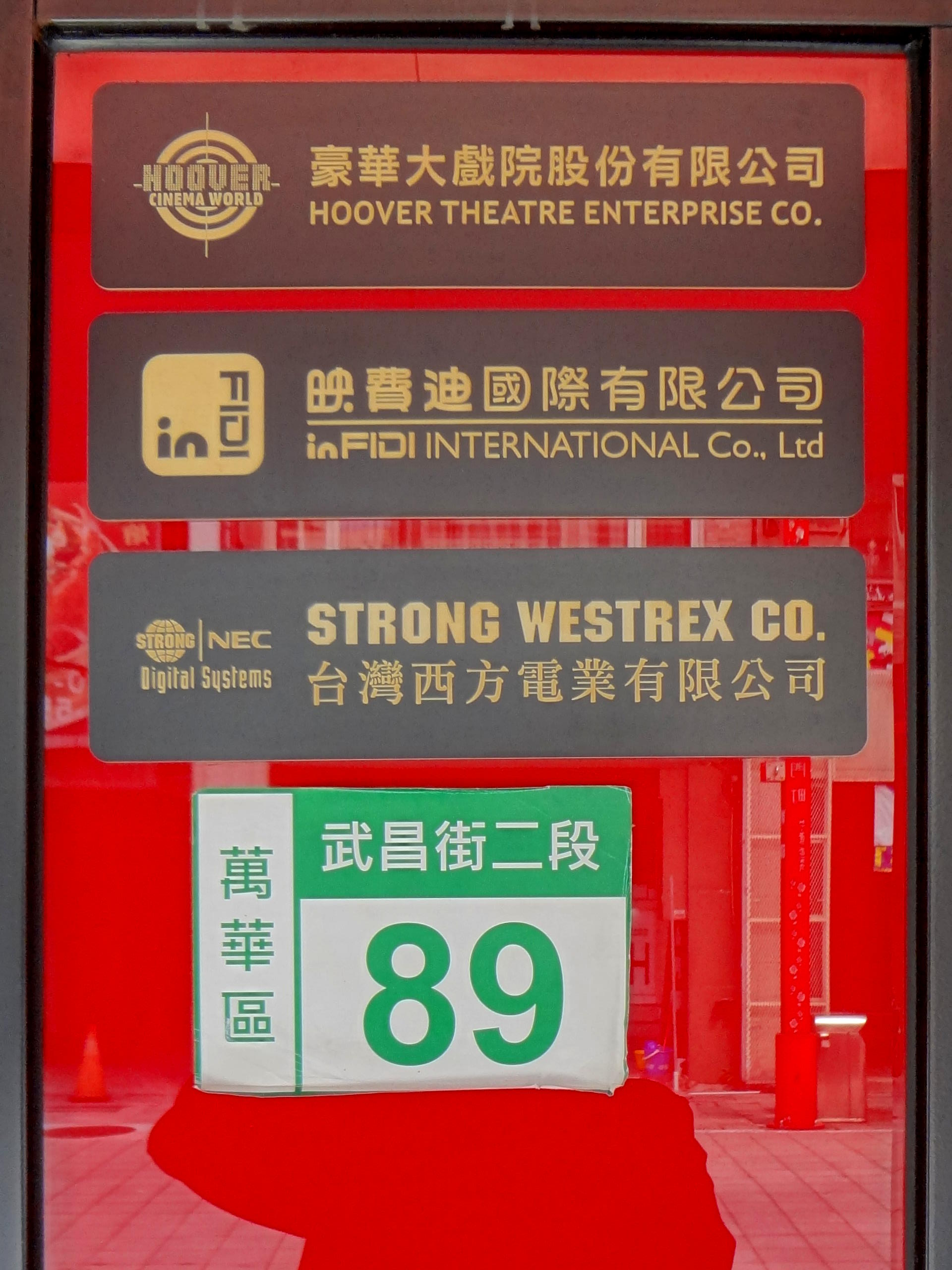 豪華大戲院總部，地址：臺北市萬華區武昌街二段89號。